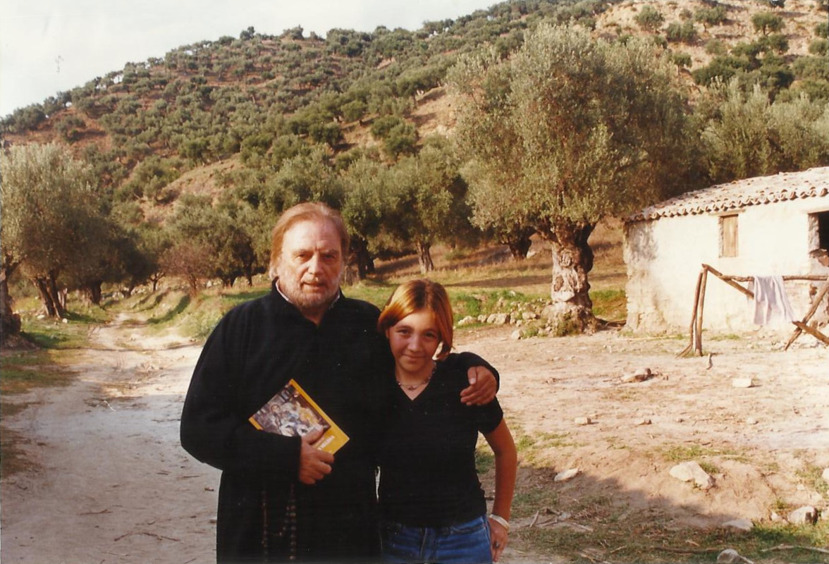 FILM Il conte di melissa (Momenti di pausa sul set dell'attore Franco Interlenghi con la pittrice scenografa Sara Amoruso)